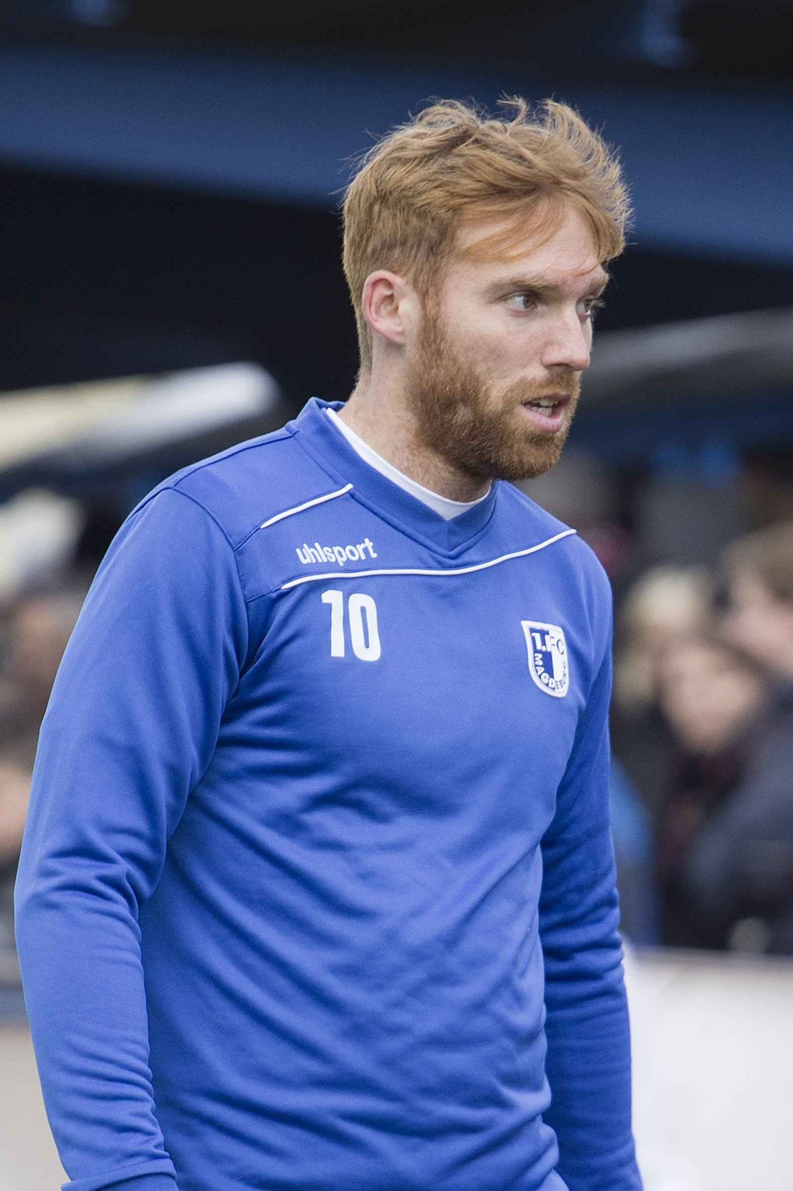 Nico Hammann